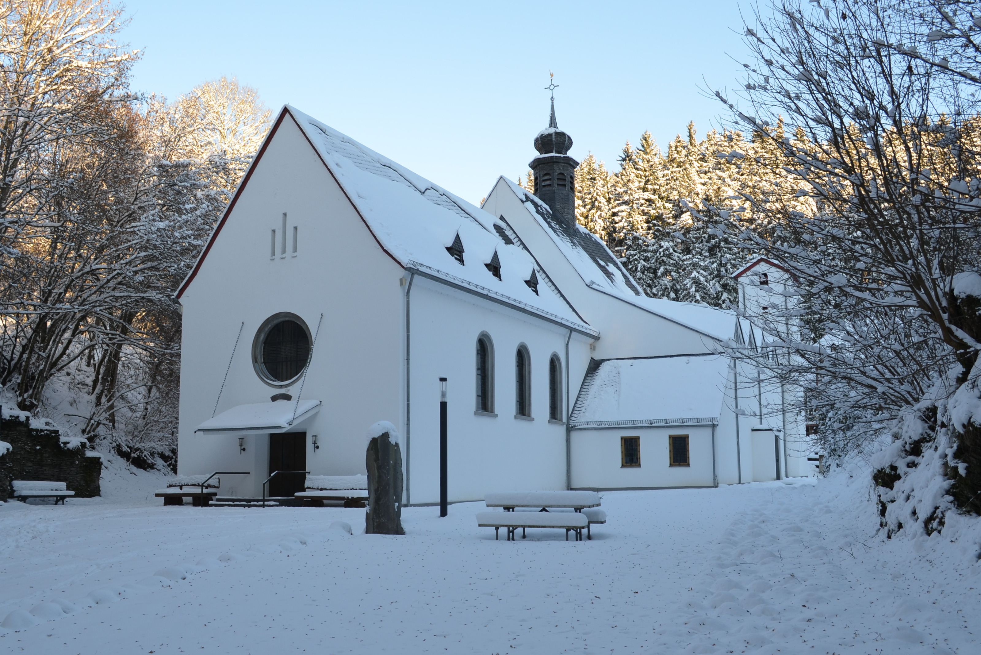 Bedevaartskerk